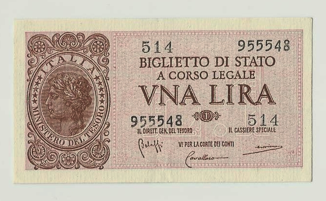 Dritto di una banconota da 1 lira del periodo della Luogotenenza